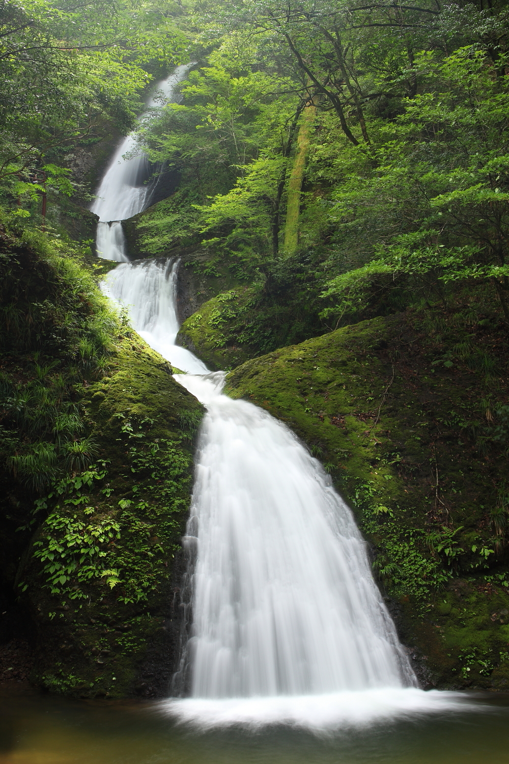 阿寺の七滝（新城市下吉田、2014年（平成26年）8月）